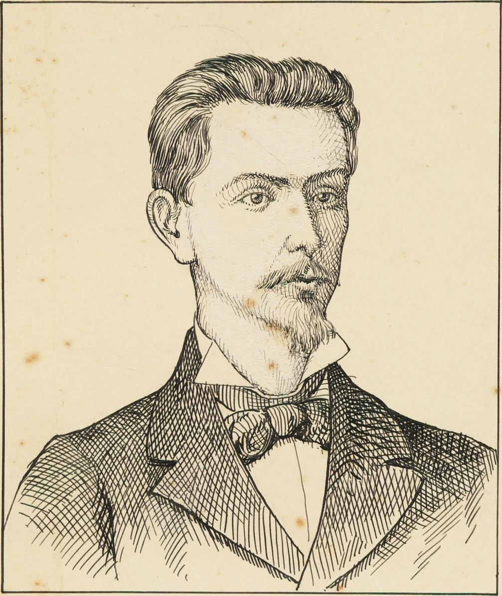 Teophilo Dias